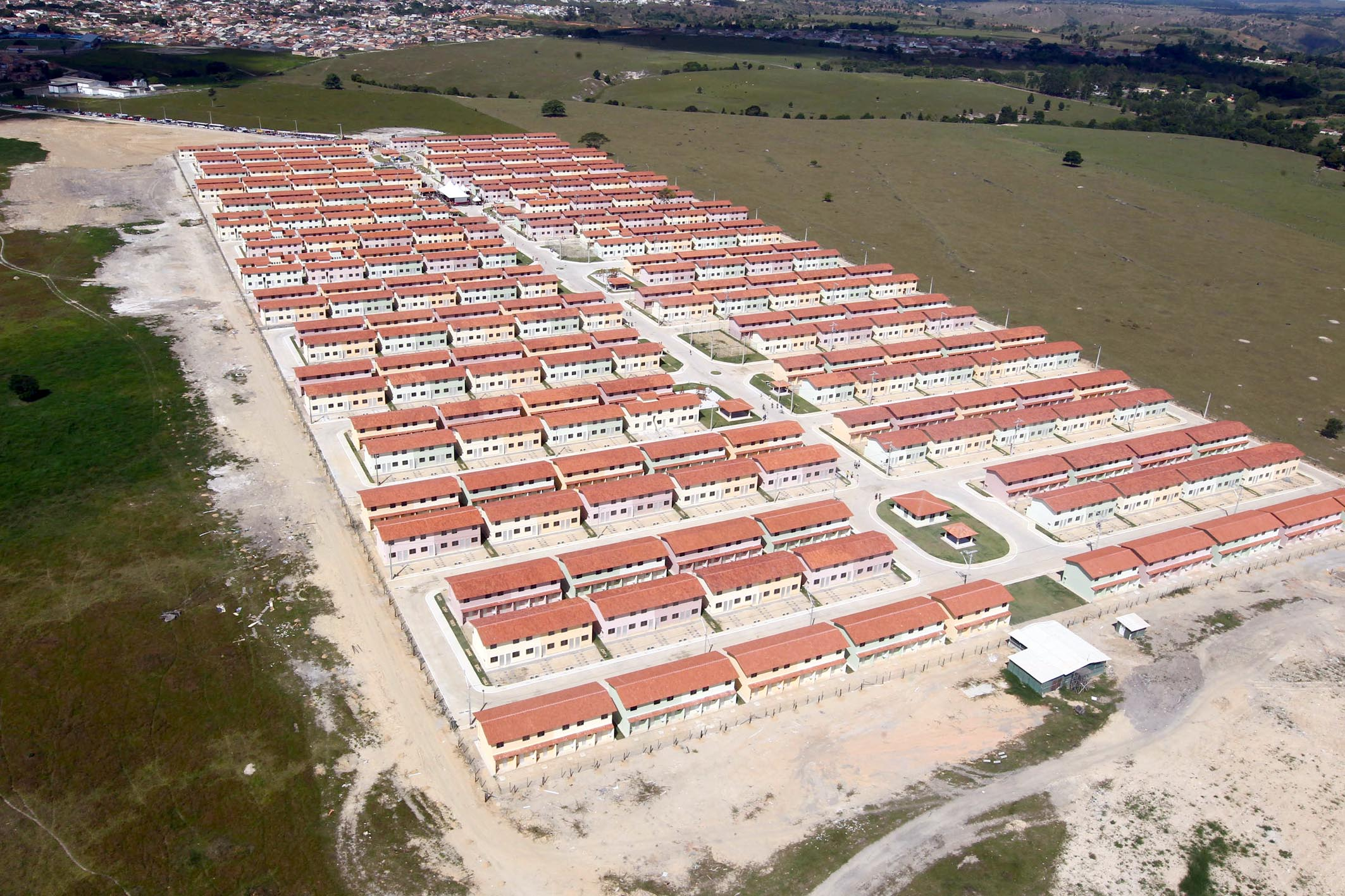 Moradias em Eunápolis (Bahia) do programa Minha Casa, Minha Vida, entregues em 2011.